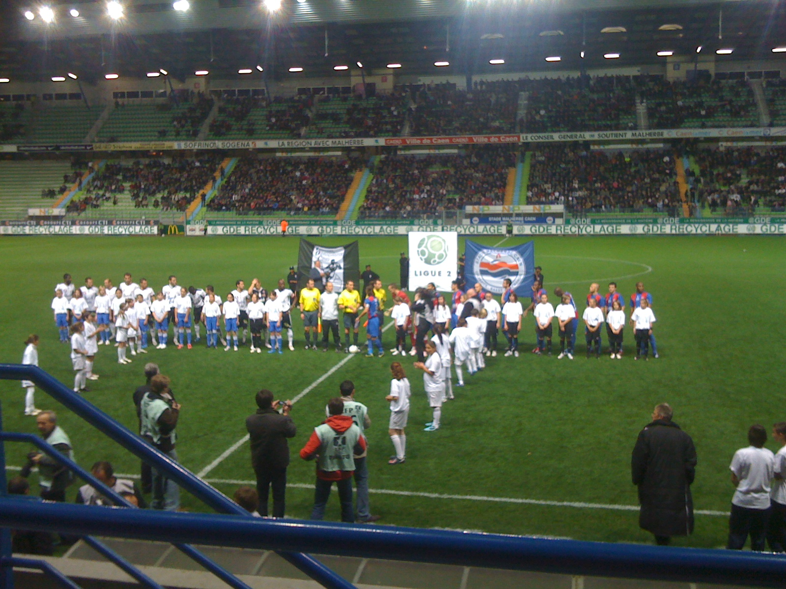 Présentation des joueurs du SM Caen et de l'Vannes OC au stade Michel d'Ornano